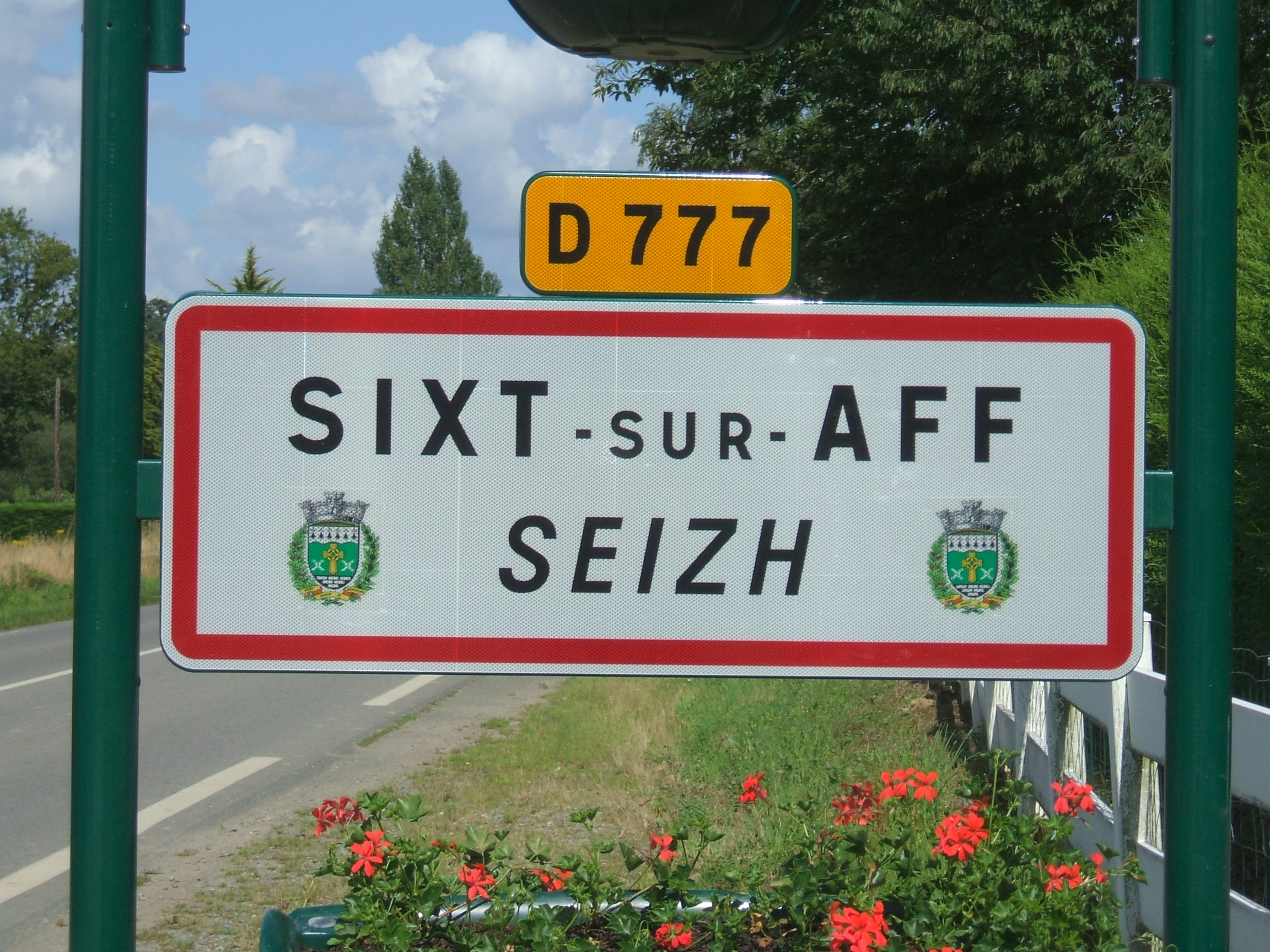 Panneau bilingue francais/breton Sixt-sur-Aff.